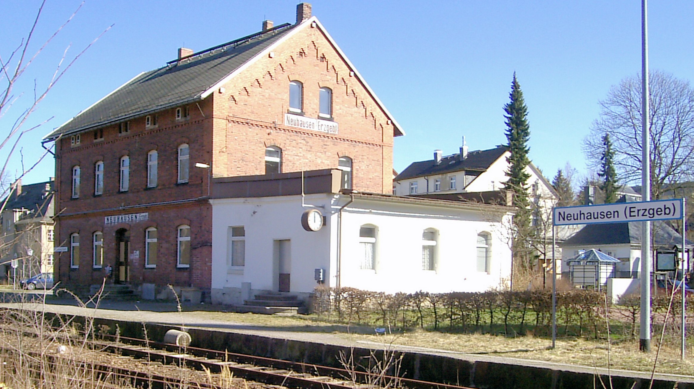 Bahnhof Neuhausen (Erzgeb.), Endpunkt der Flöhatalbahn